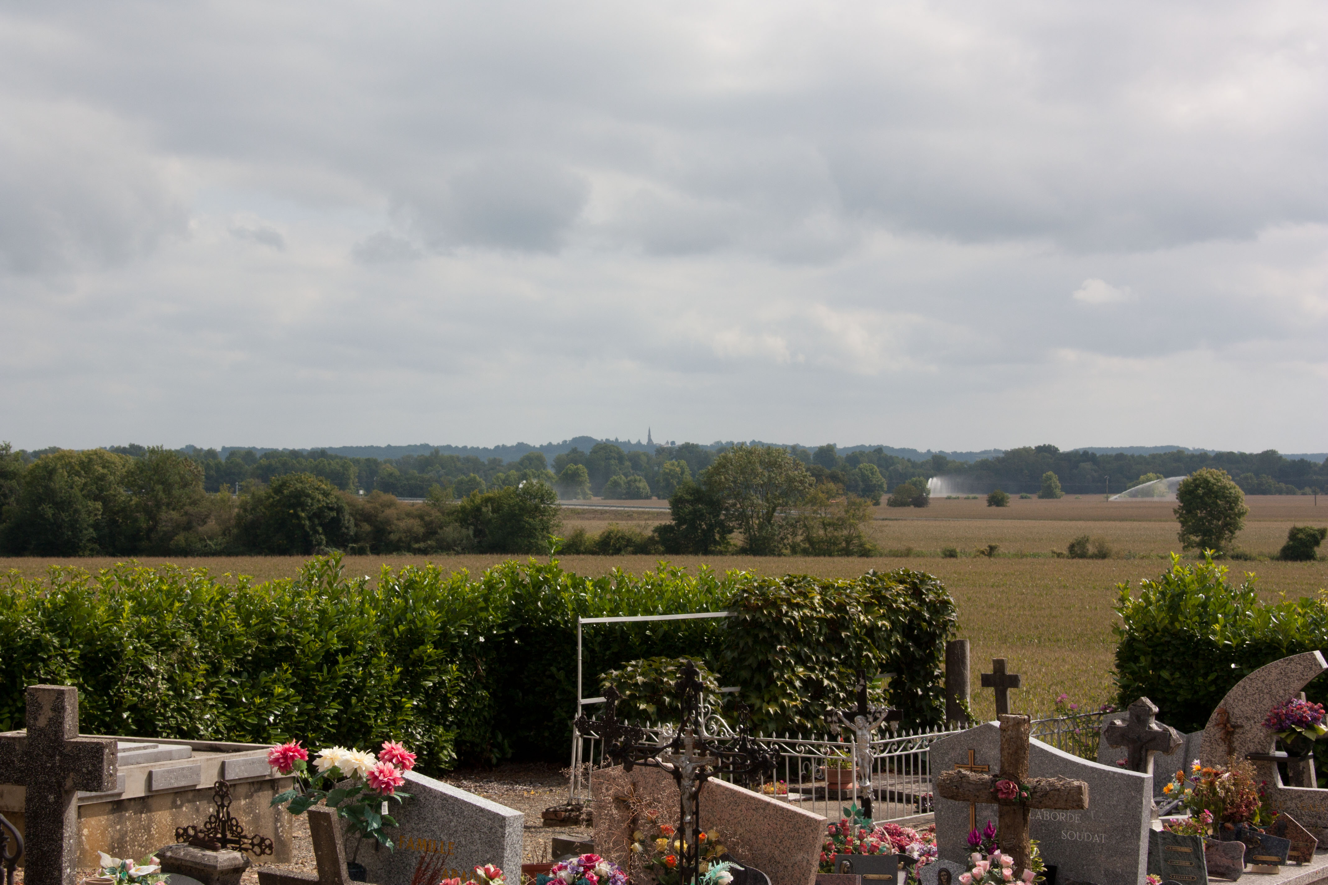 La plaine de l'Adour vue depuis l'église de Sombrun - Sombrun, Hautes-Pyrénées, France